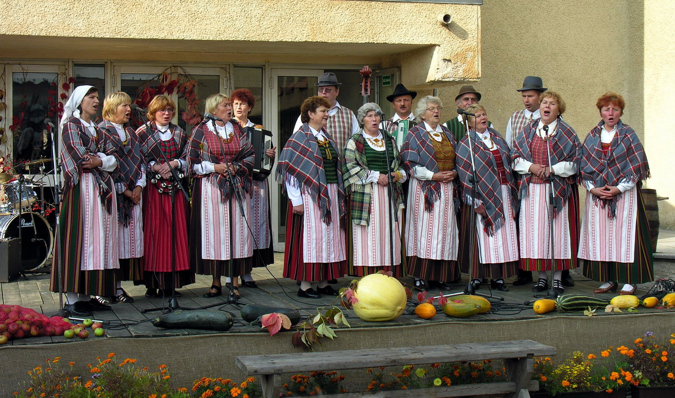 Žemaitėška: bat-smg:„Šatrėjė", Loukės kultūras nomū fuolkluora ansamblis Puortegrapėjė Algėrda, 2006 m. spalė 1 d., bat-smg:Žemaitėjė